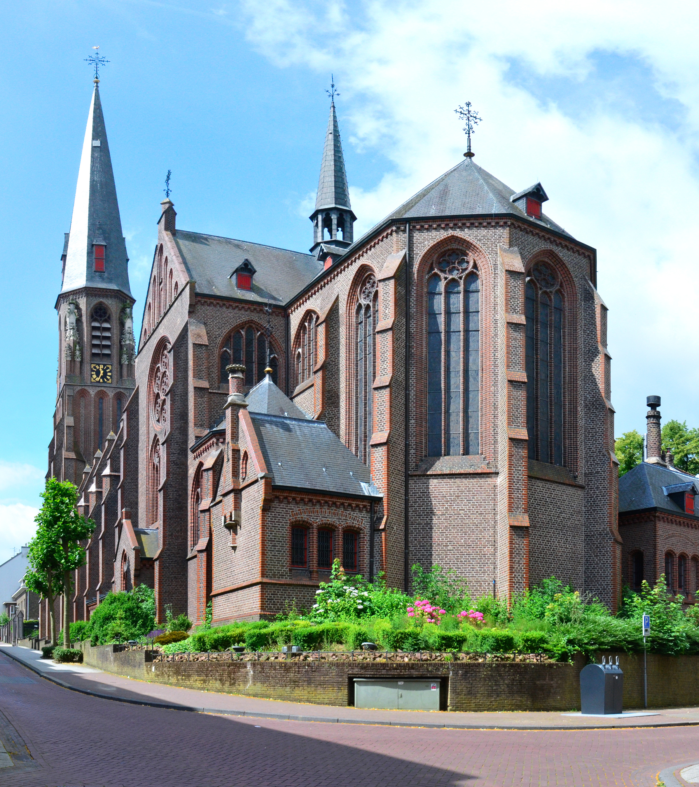 Sankt-Pauls-Kirche, Vaals This image was created with Hugin